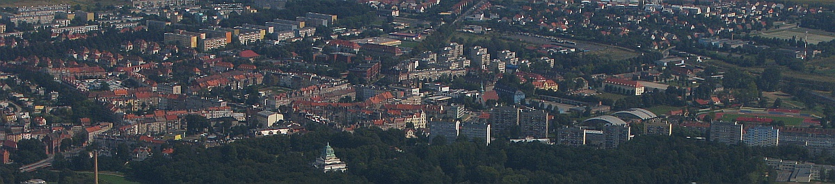 Zgorzelec Panorama Zgorzelca Fotografia z powietrza Nysa Luzycka Rzeczpospolita Polska Foto 2008 Wolfgang Pehlemann Wiesbaden Germany IMG_0023